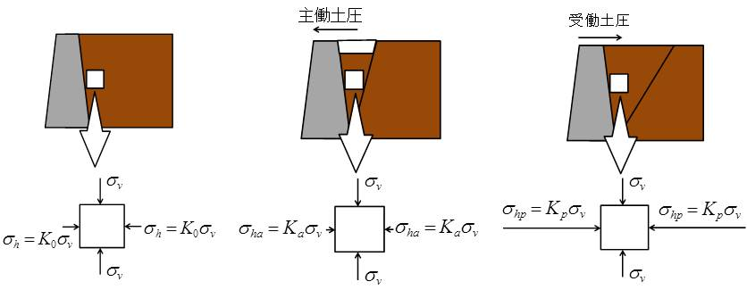 地盤の状態をしめす。